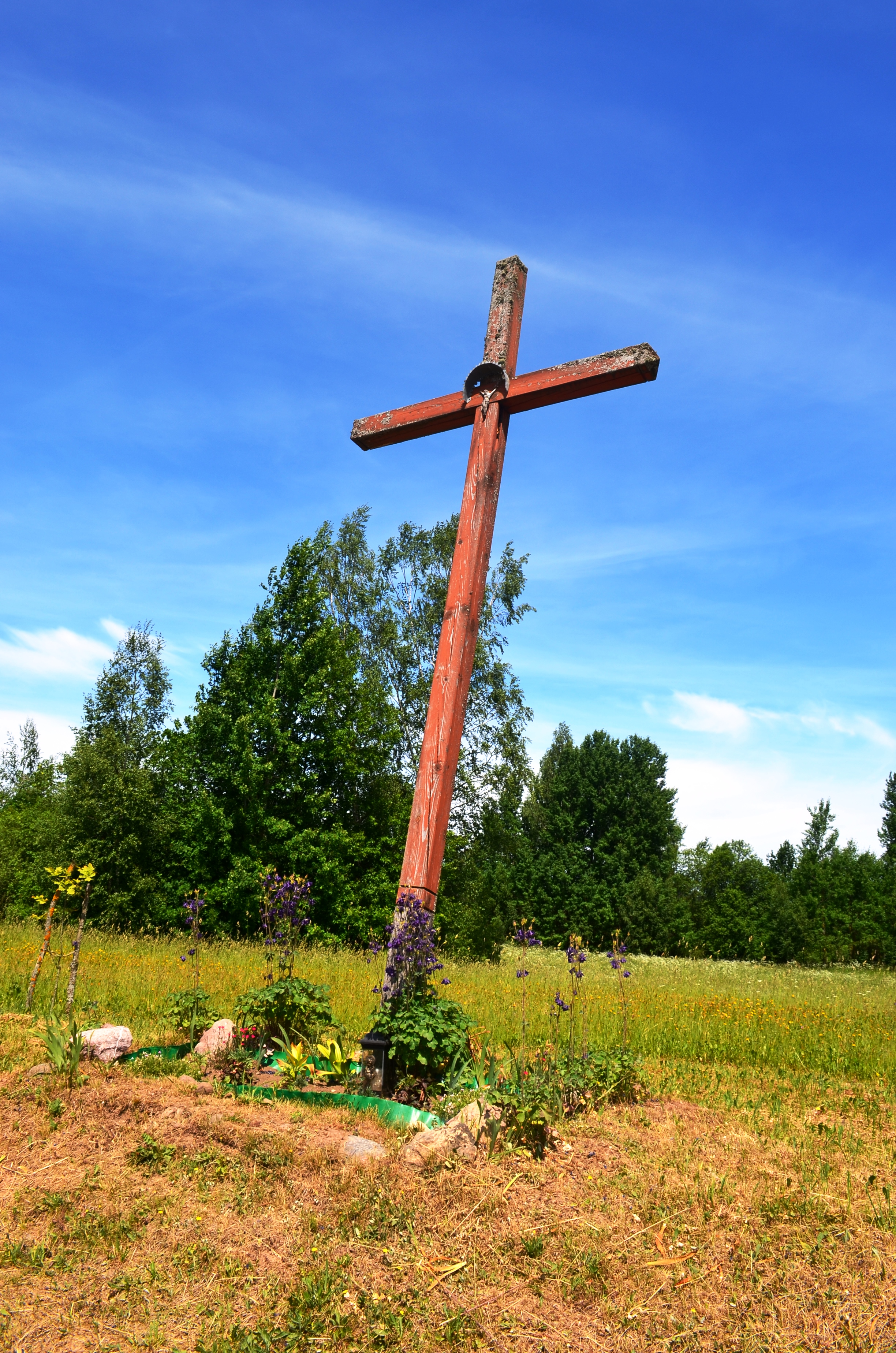 Kryžius, Unguriškės, Vilniaus raj.